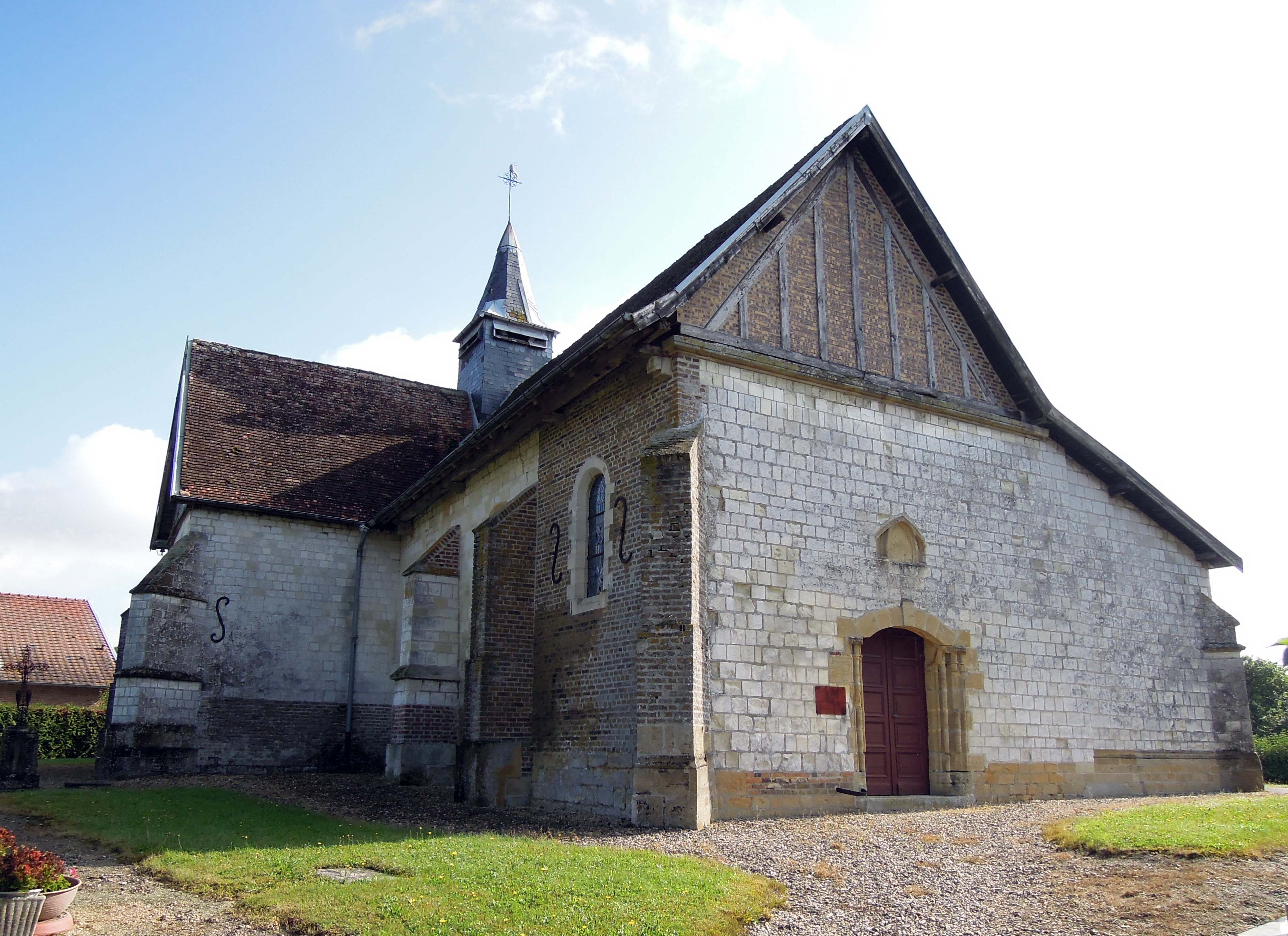 Église Saint-Remi, (Inscrit, 1926) .